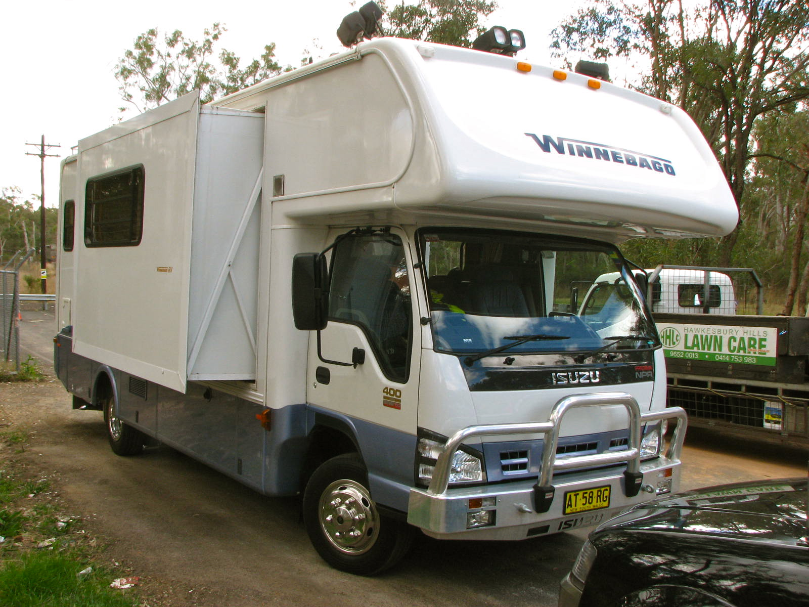 Isuzu NPR Winnebago NSWPF Drug Testing Unit